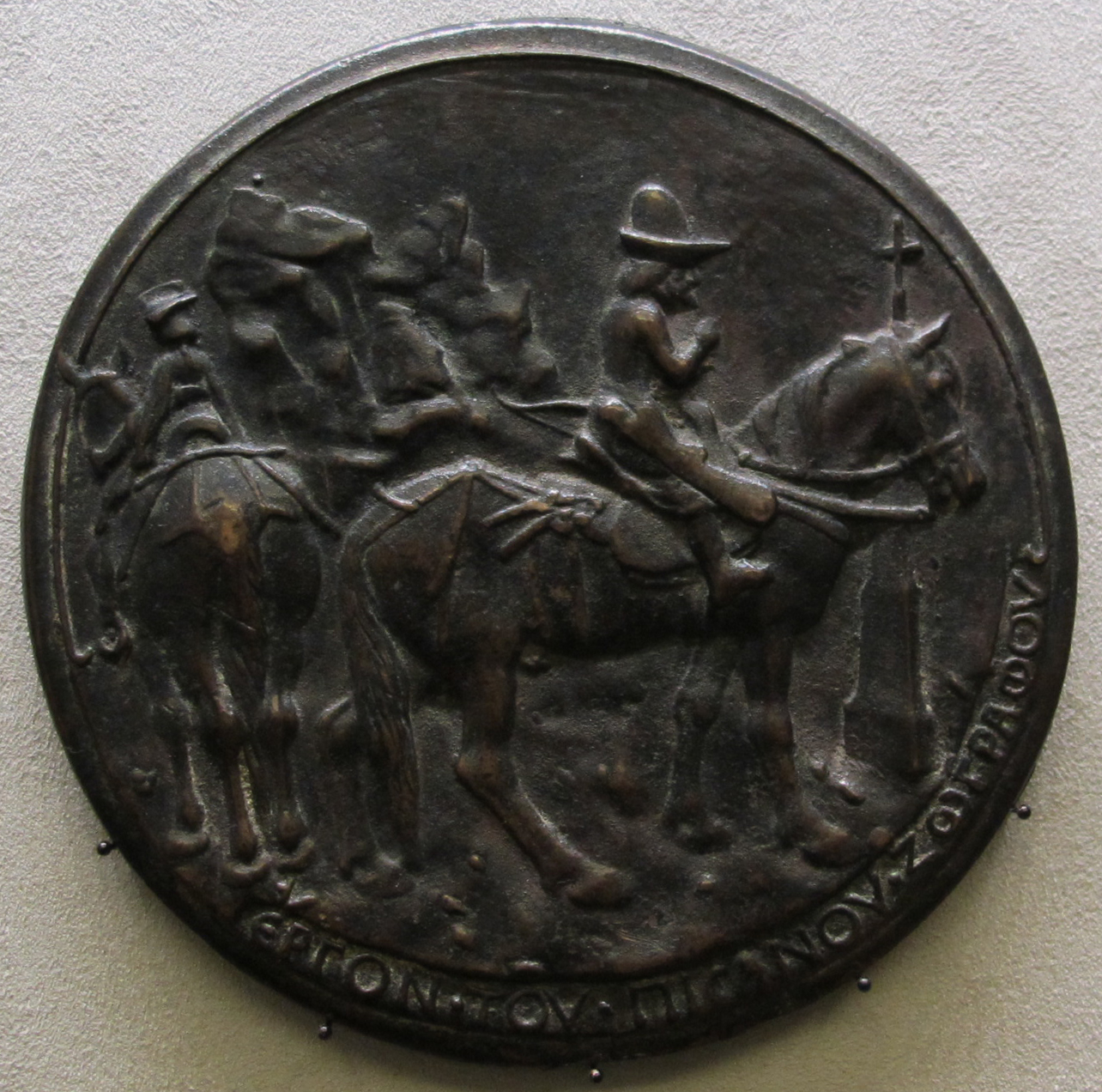 Pisanello, medaglia di giovanni paleologo, 1438-39 ca. verso